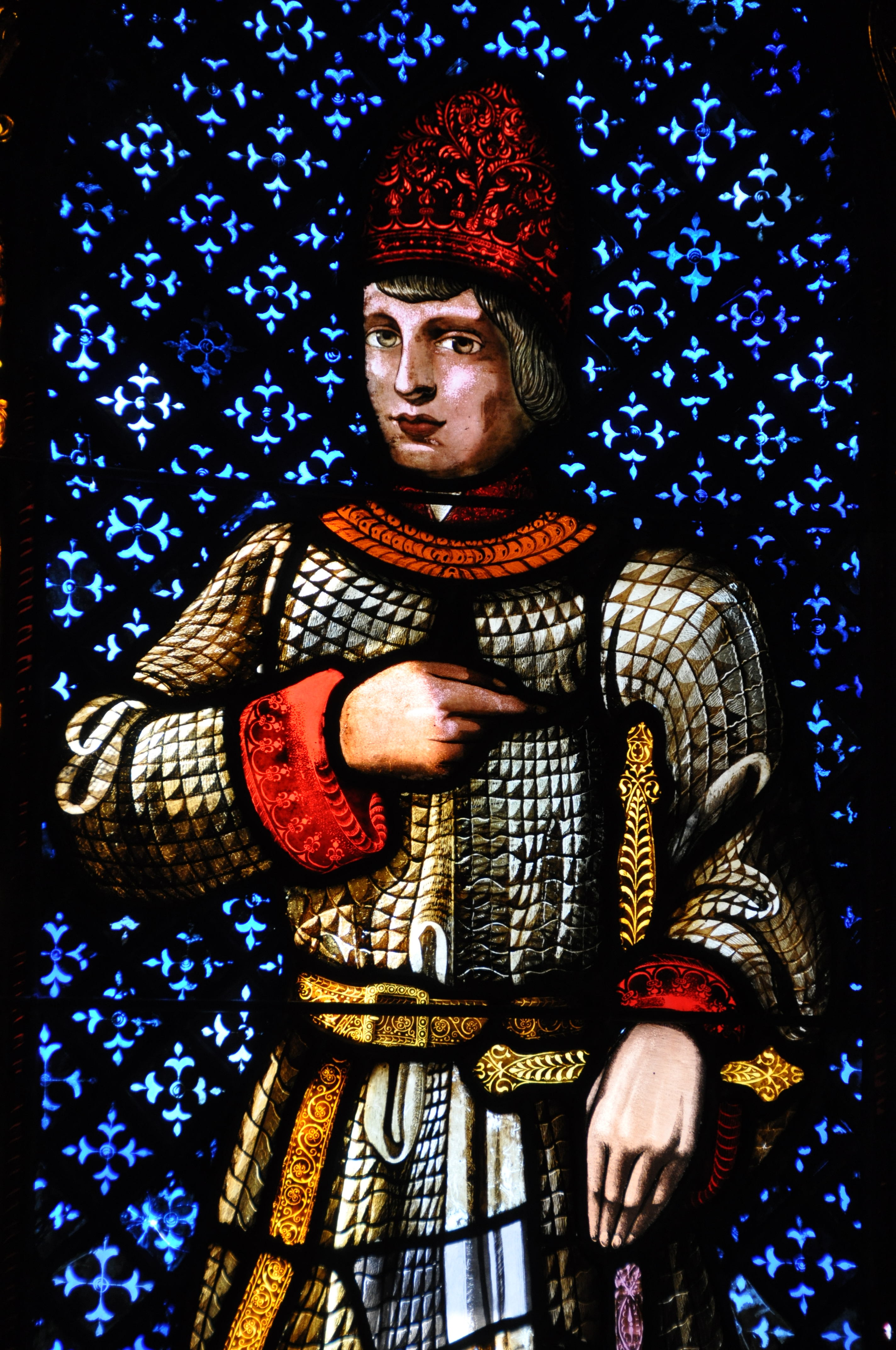 Barcelona. Capella de Santa Àgata. Vitrall: el Príncep de Viana, obra de Georg Muller (1858) sobre disseny de Josep Mirabent